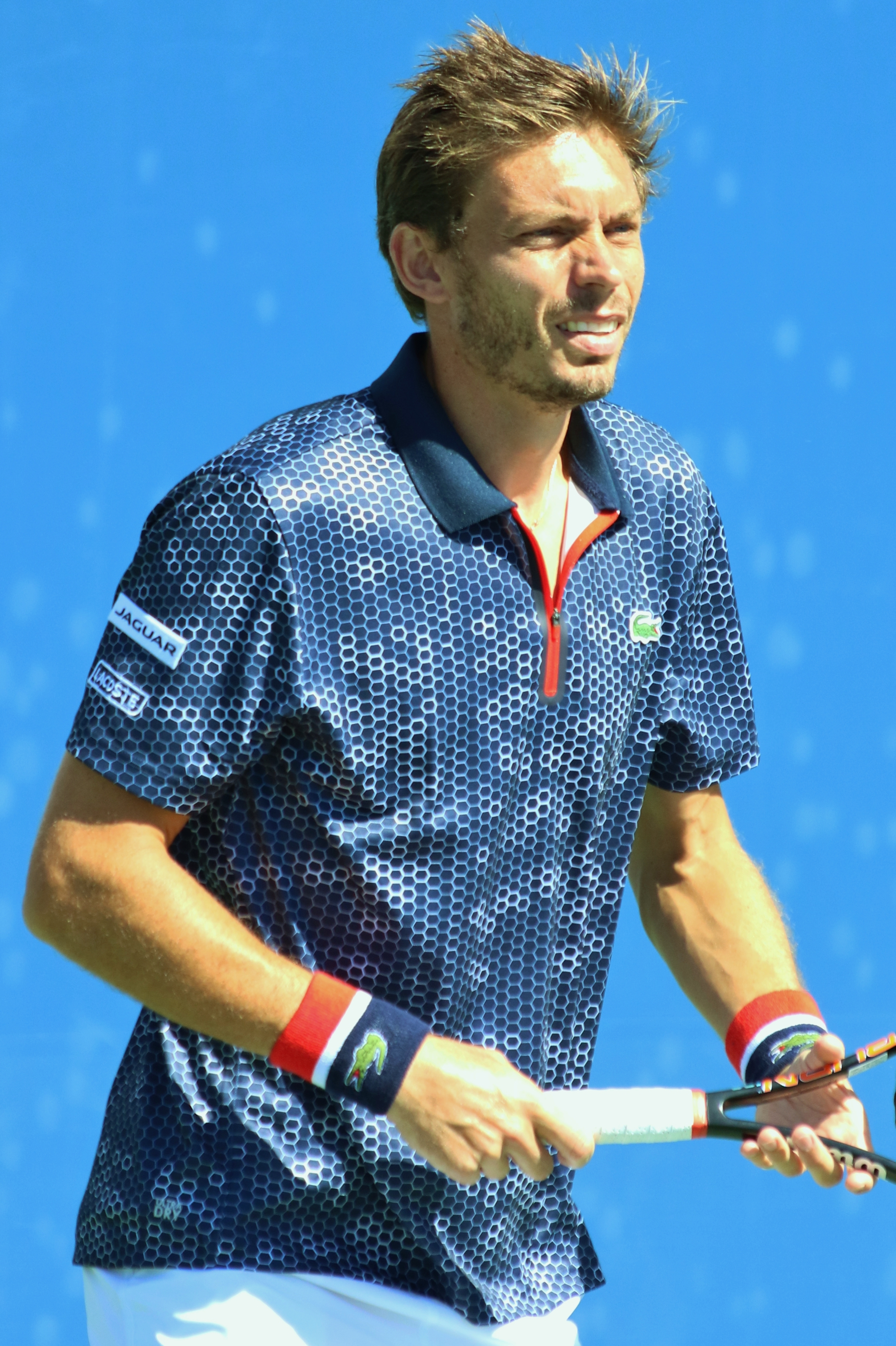 Mahut US16 (29)